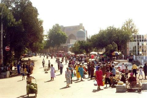 samarkand, uzbekistan